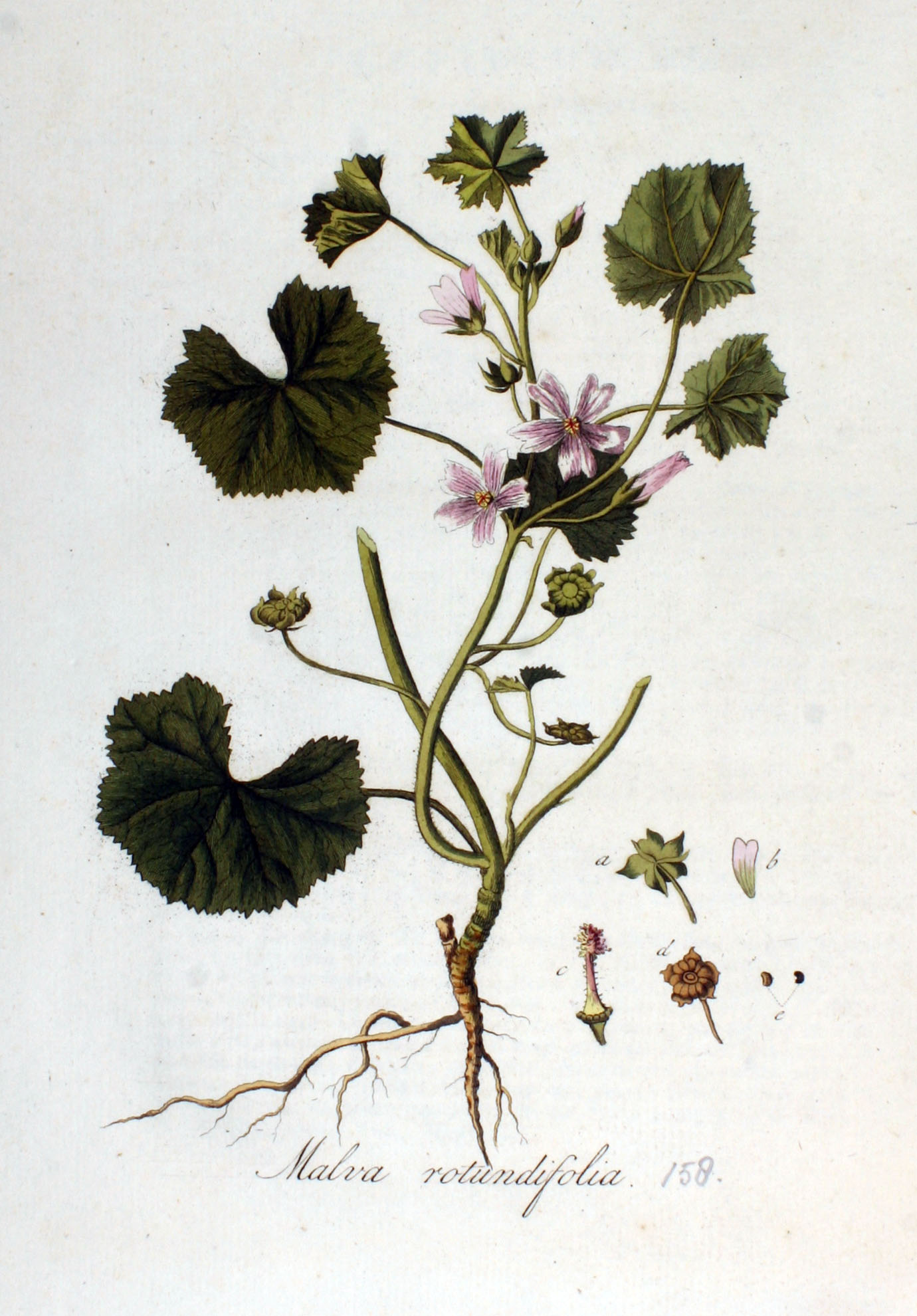 Malva neglecta Wallr. (Syn. Malva rotundifolia auct. non L., nom. rejic.)